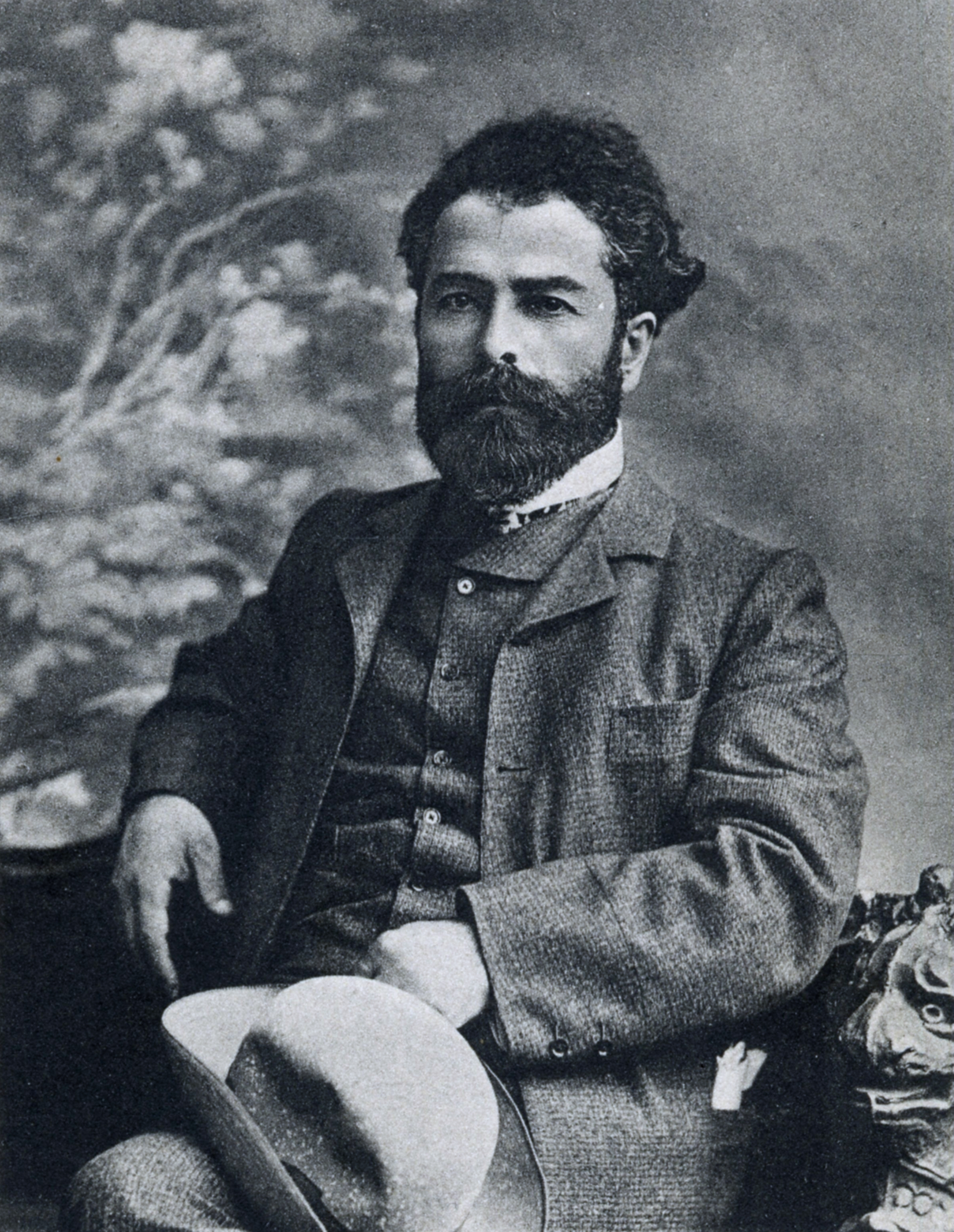 Церетели, Симон Николаевич